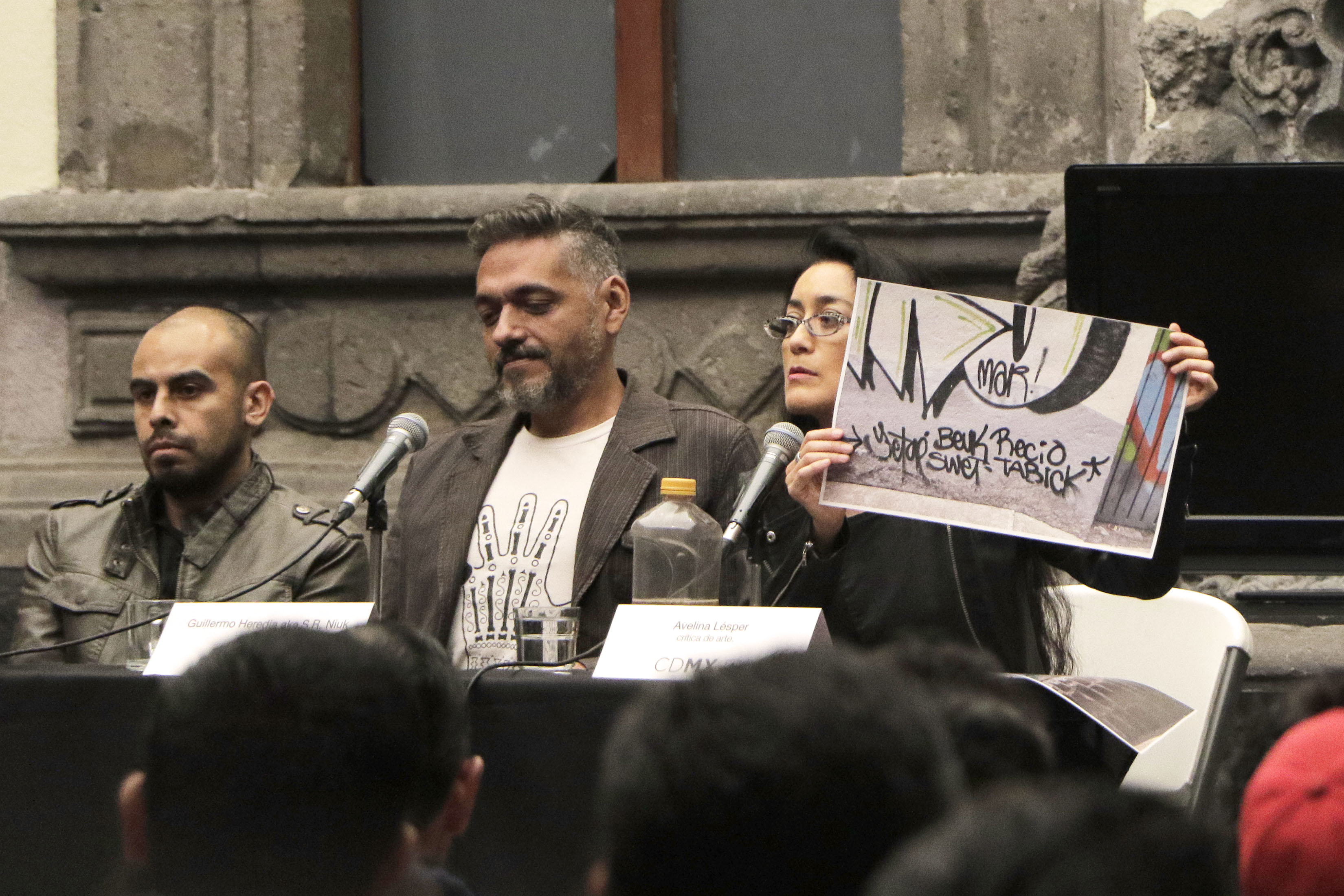 Sábado 4 de agosto Museo de la Ciudad de México, se llevó a cabo un debate en torno al grafiti como medio de expresión, con la participación de la artista plástica y expositora Avelina Lésper y sus invitados Guillermo Heredia S.R. Niuk y el artista plástico Eblem Santana. Fotografía: Tania Victoria/ Secretaría de Cultura CDMX